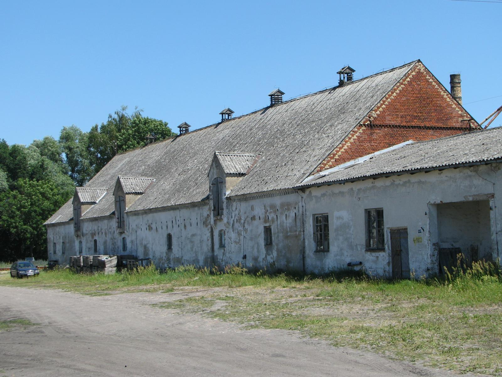 Wojcieszyce. Obora na terenie dawnego folwarku.